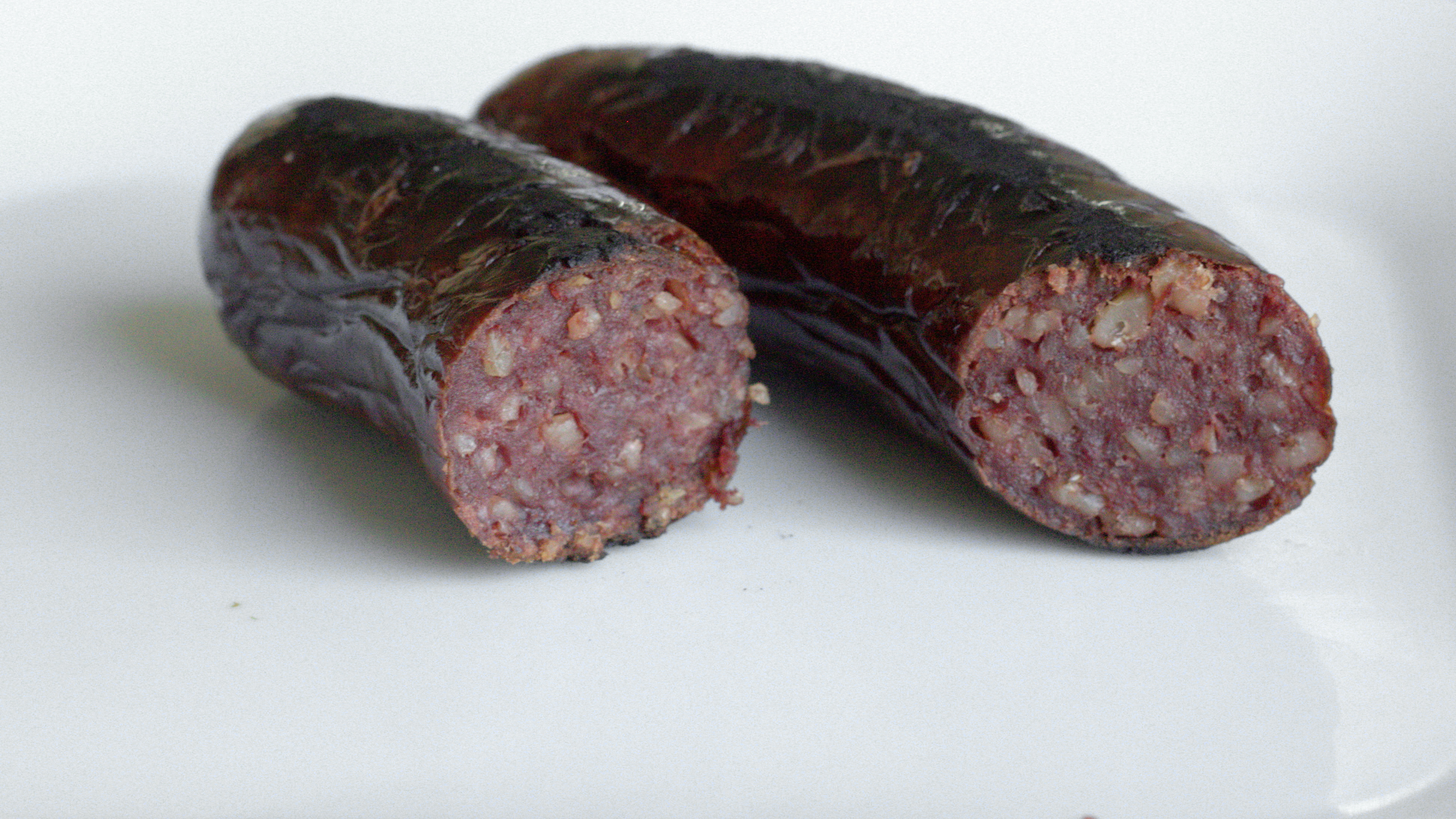 Ryynimakkara